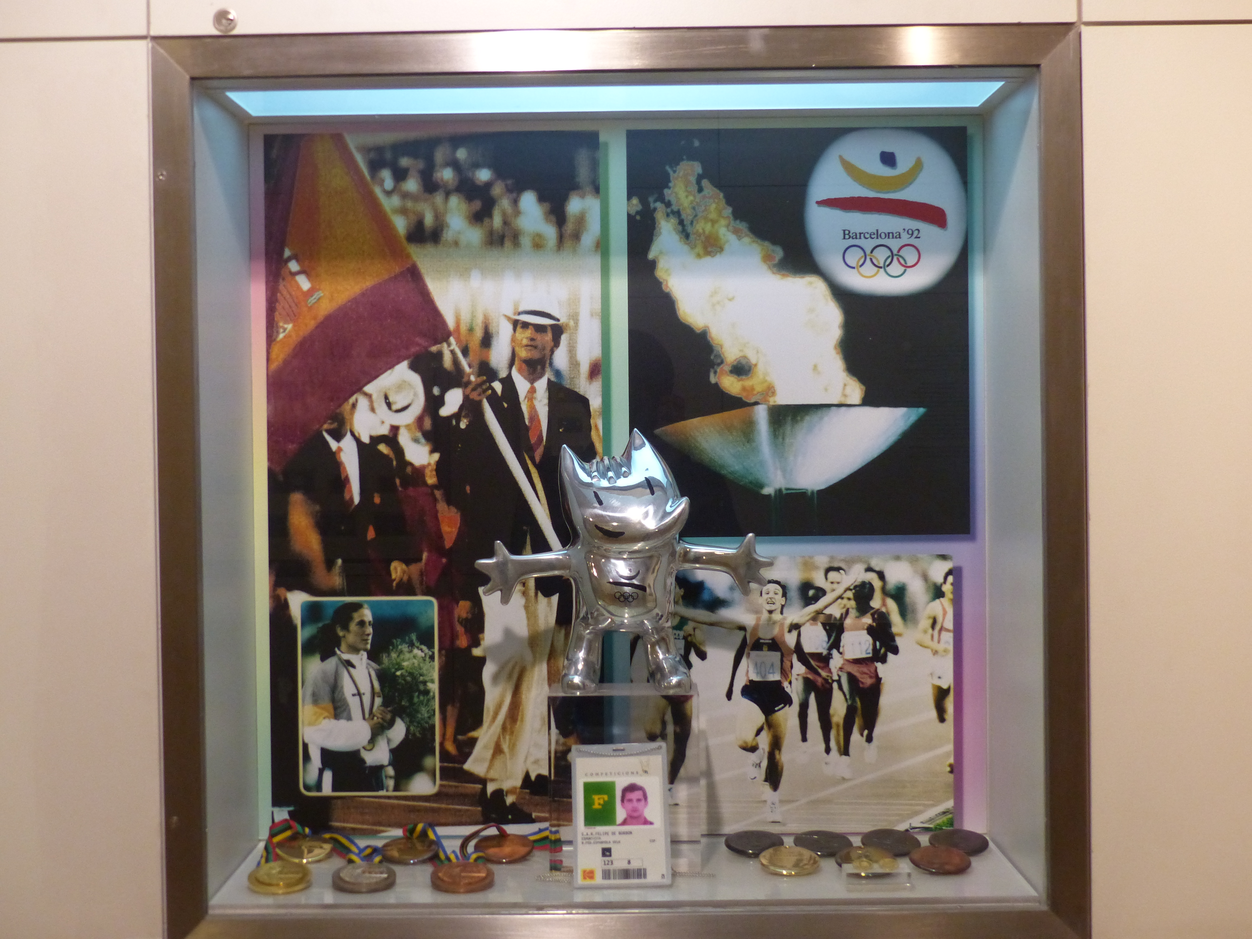 Acreditación de Felipe.